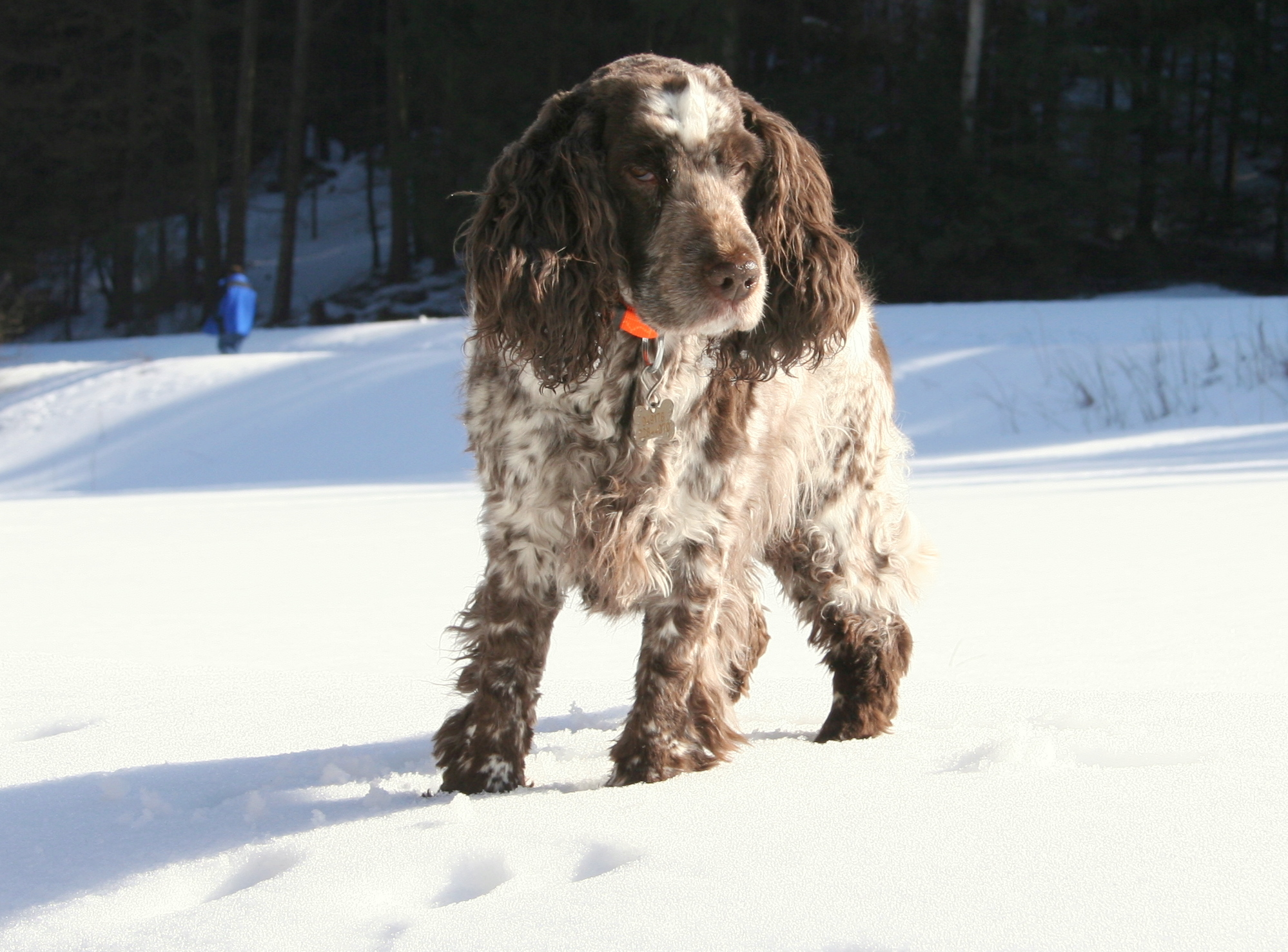 Cocker Spaniel, Braunschimmel, Hündin